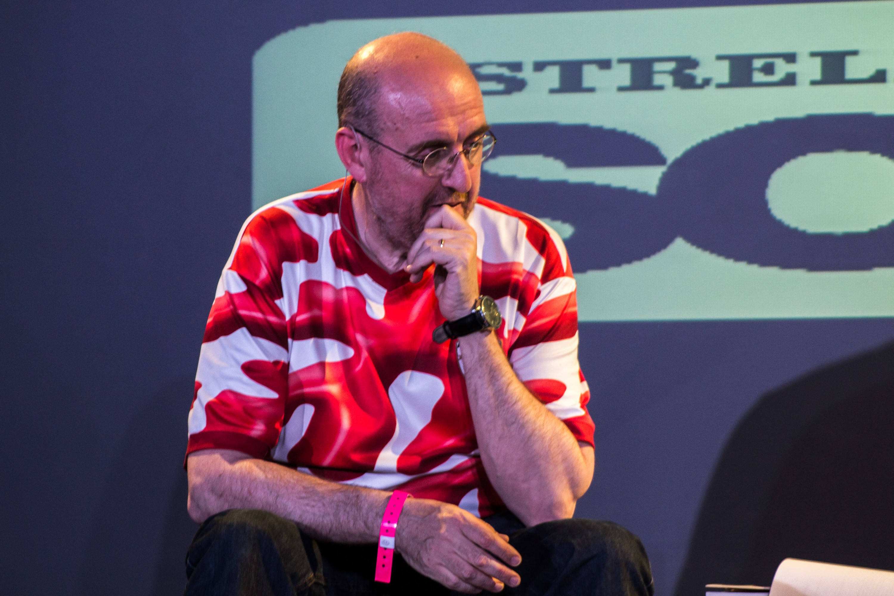 Fernando Castro Flórez (Plasencia, 1964) es un filósofo español especialista en Estética, crítico de arte y profesor en la Universidad Autónoma de Madrid.